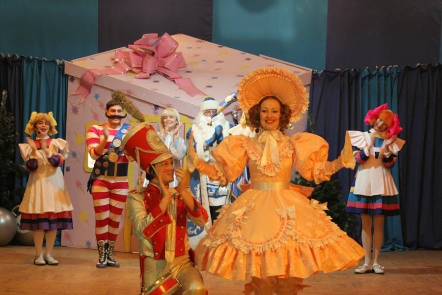 Новогоднее представление Саратовского театра кукол «Теремок» «Тайна снежных часов»